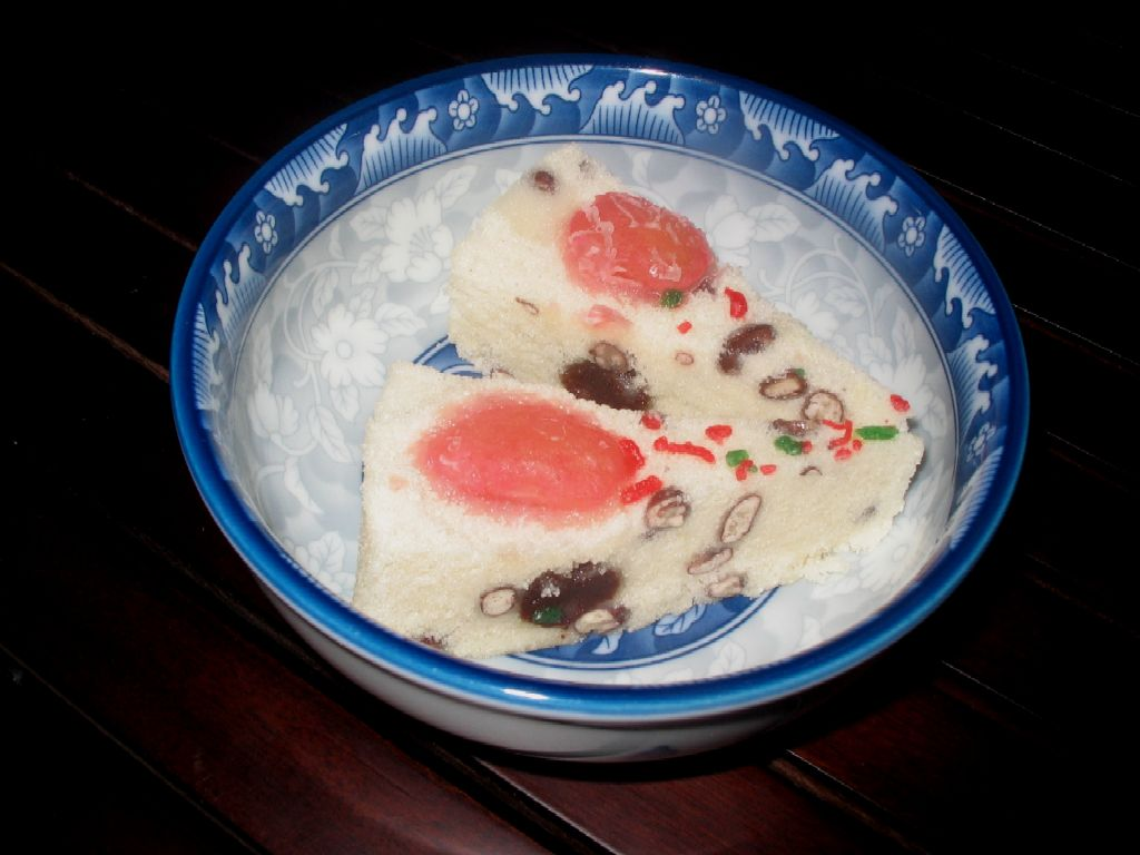 Song gao